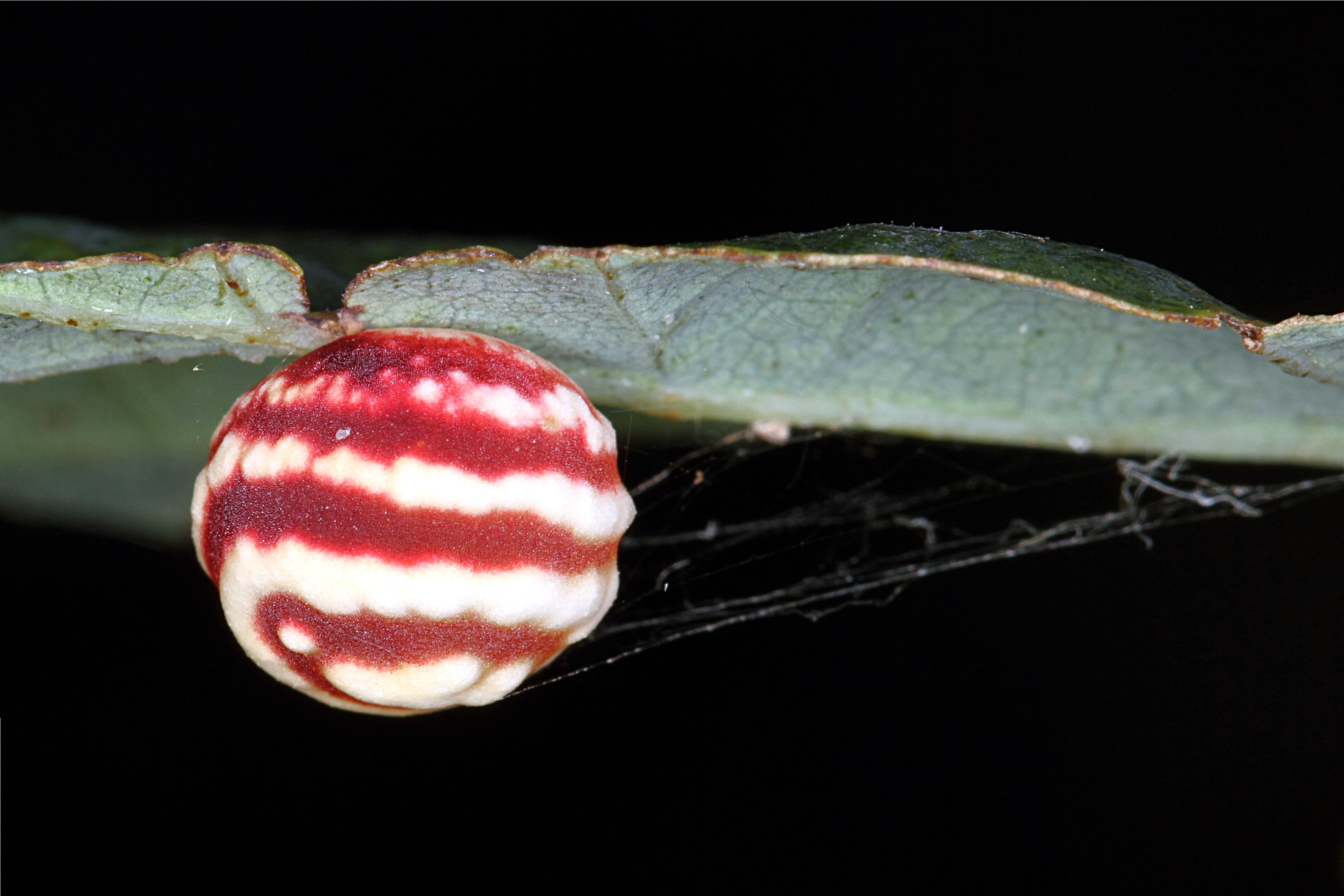 Gestreifte_Eichengallwespe_(Cynips_longiventris), Sachsen, Waldrand, Laubwald, Eiche, 400 m ü. M.